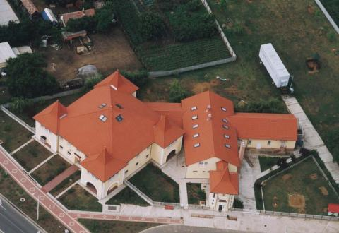 Nyirlugos Hungary aerialphotography